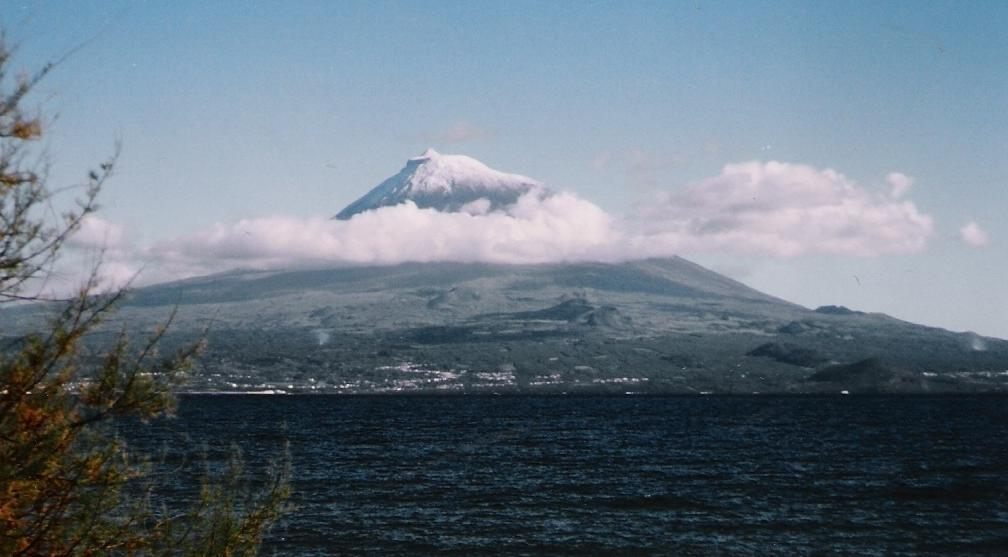 Montanha do Pico, Ilha do Pico